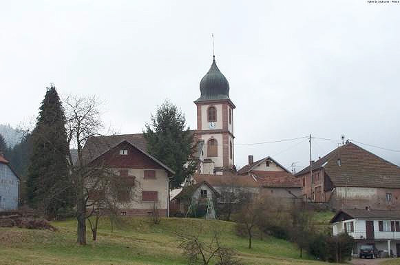 Village de Saulxures